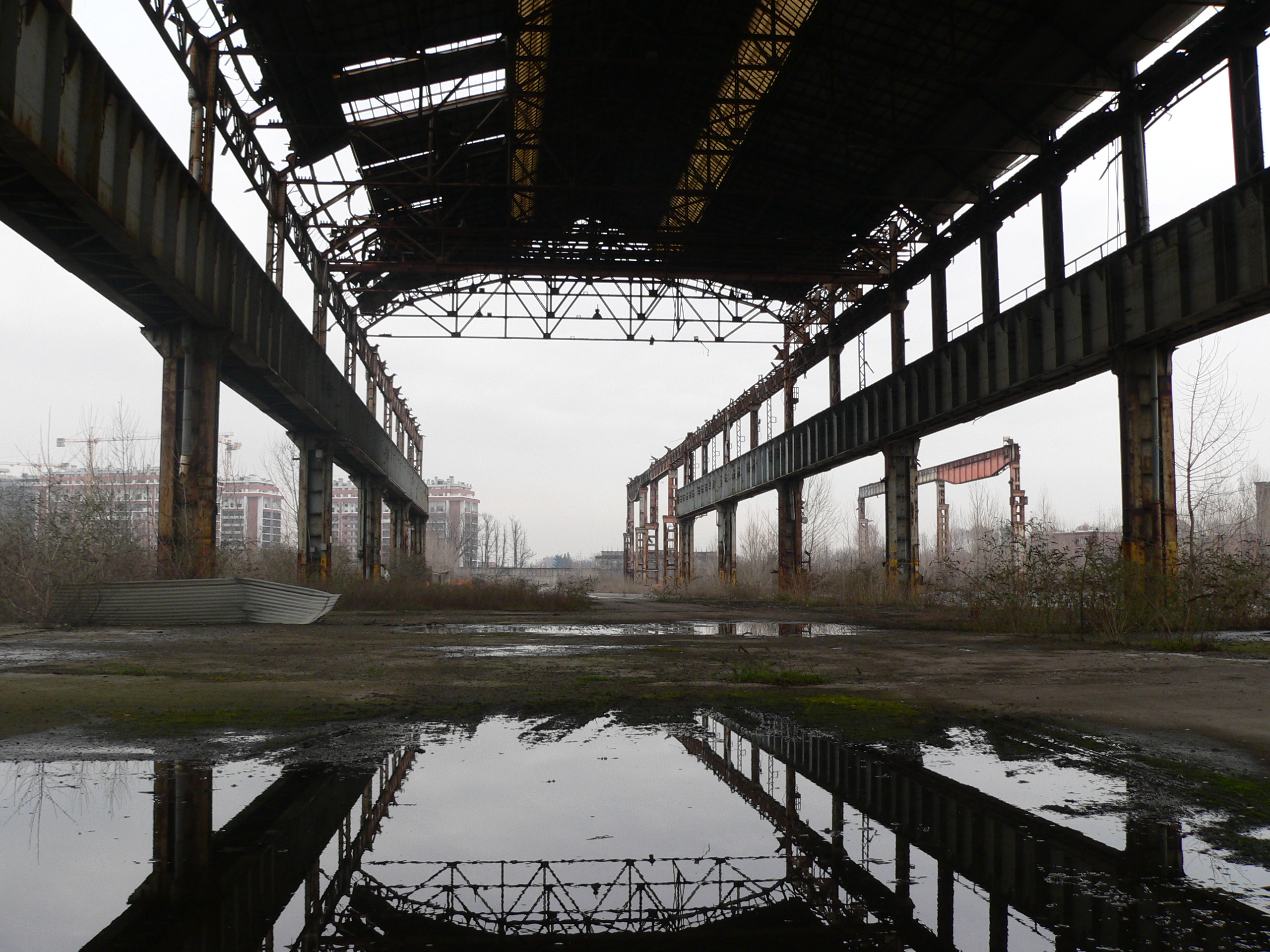 Comparto Unione area ex-Falck Capannone bramme Questo capannone faceva parte dello stabilimento Falck Unione di sesto San Giovanni, Era il capannone di raccordo tra l’Acciaieria con i forni a fiamma Martin-Siemens, l’Acciaieria con i forni elettrici e il reparto Laminatoio, che comprendeva tutta l’area fino alla ferrovia con confine a nord su via Trento. Dal 1983, anno in cui cessa la produzione dei lingotti, fino alla chiusura, l’edificio era usato come parco per le bramme prodotte all’impianto di colata continua. Le bramme sono dei semilavorati a sezione rettangolare con spigoli arrotondati, destinate a lavorazioni successive. Da qui le bramme venivano avviate al forno a barre mobili del treno nastro o a operazioni di controllo e condizionamento. All’Unione le bramme servivano per produrre il nastro. In questo capannone le bramme erano sottoposte a controlli e a operazioni di condizionatura per rimuovere i difetti. La parte più a nord del capannone (lato Monza) era l’area di scarico e deposito dei rotoli di nastro prodotti al Laminatoio. Il capannone bramme sorge oggi in un'area dismessa. E' tutelato dal PGT del Comune di Sesto San Giovanni come bene storico documentale e rientra tra gli edifici del progetto di candidatura di Sesto per l'UNESCO per la categoria del paesaggio culturale evolutivo. This is a photo of a monument which is part of cultural heritage of Italy.